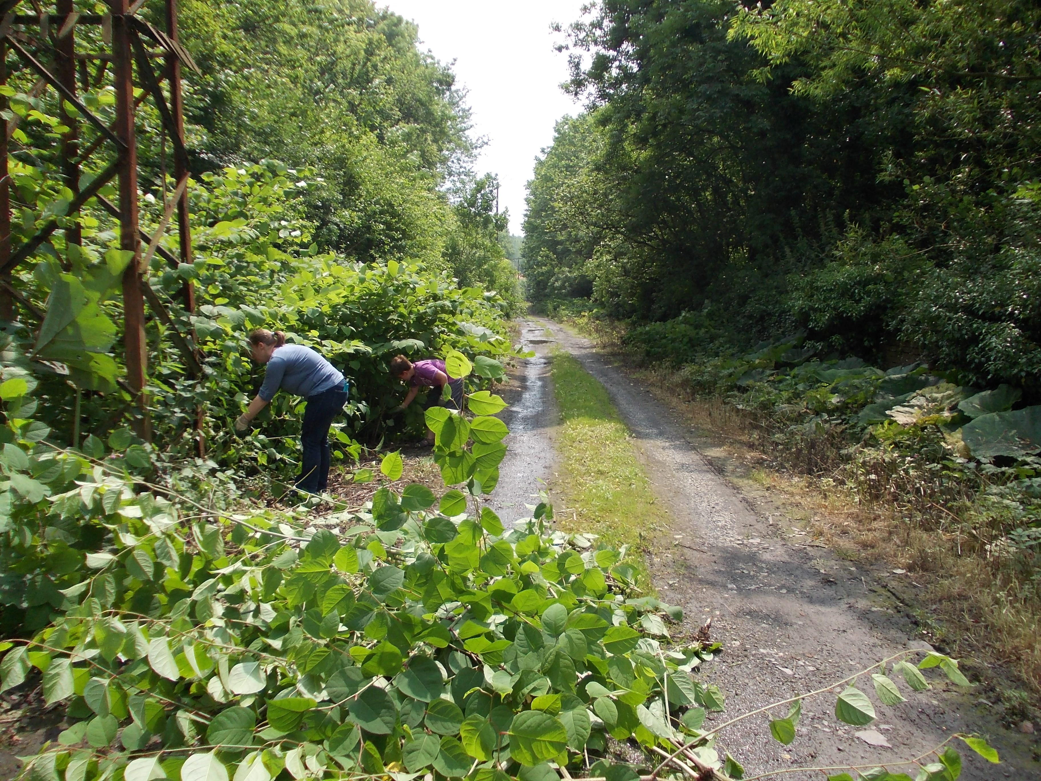 Lutte contre la Renouée du Japon